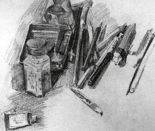 Врубель Художні прилади.jpg: монохромний малюнок